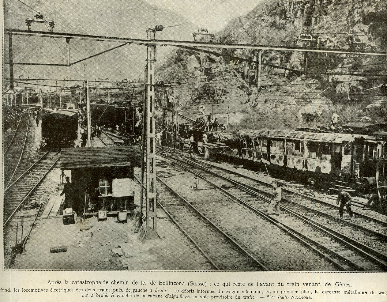 Catastrophe de Bellinzona